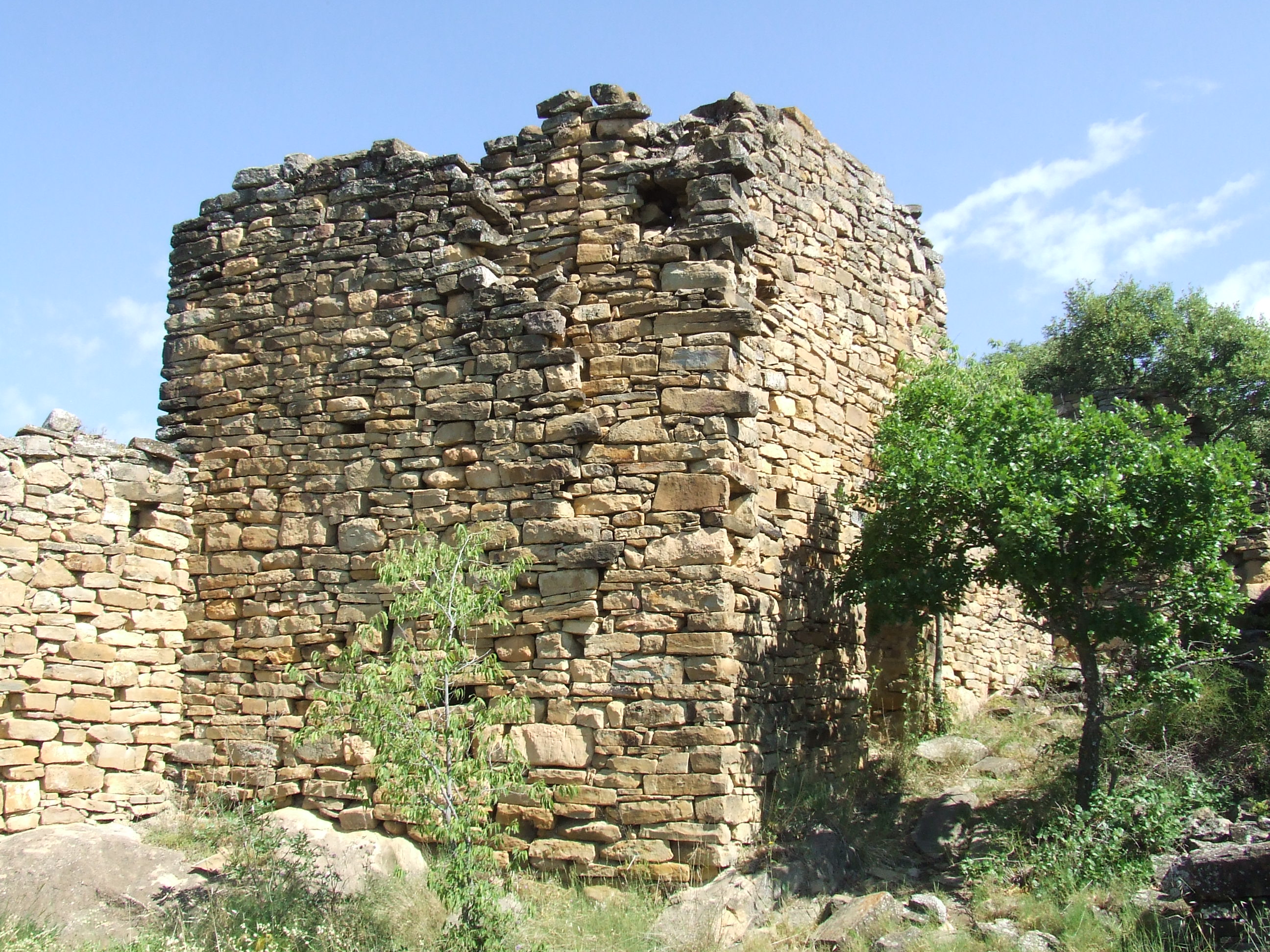 Restes, potser, del castell de Castelló d'Encús (Talarn, Pallars Jussà)